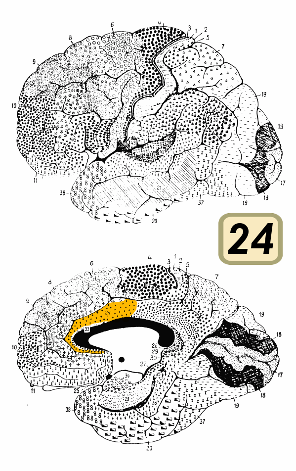 Brodmann area 24.